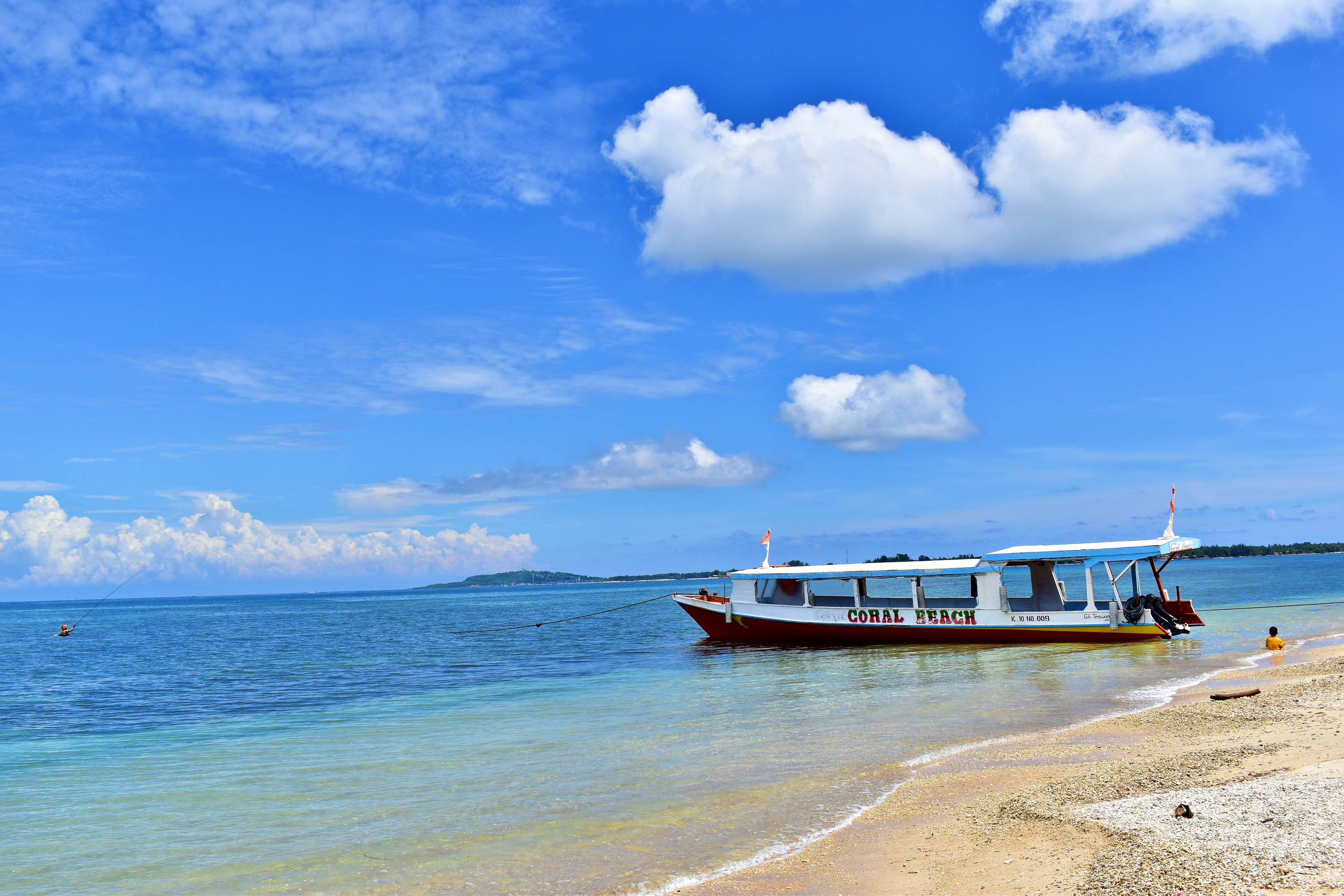 dari pantai sejuk kita juga dapat melakukan penyebrangan menuju gili trameno